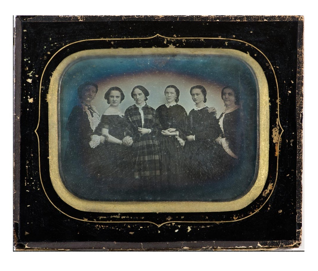 Gjestespillende kvinnelige skuespillere fra Det norske Theater i Trondheim ant. 1854.